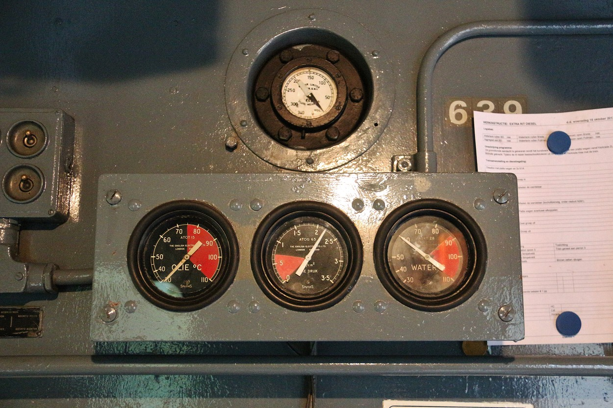 Klokjes 639 Zuid-Limburgse Stoomtrein Maatschappij